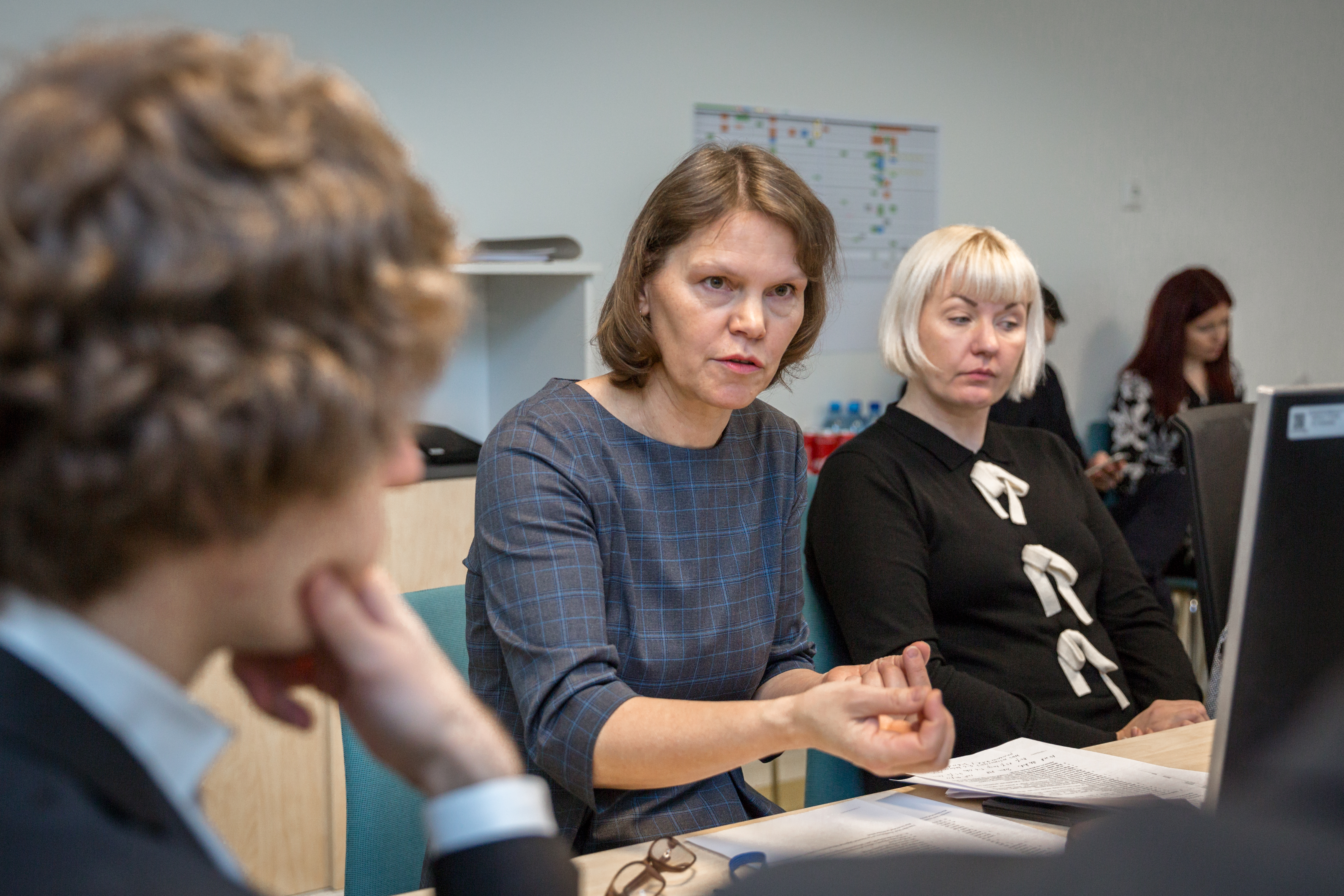 Terviseameti juhataja Merike Jürilo